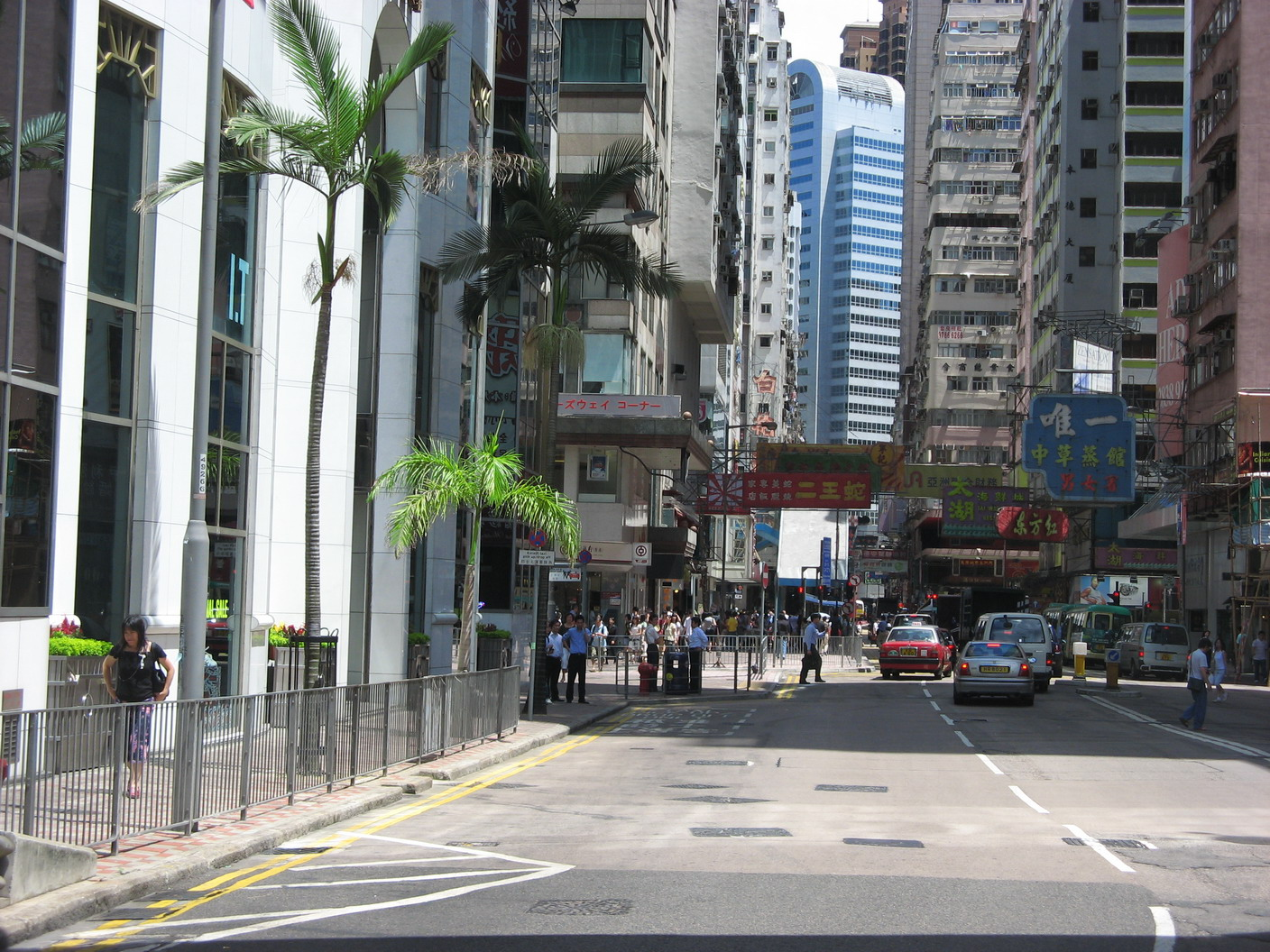 香港銅鑼灣波斯富街